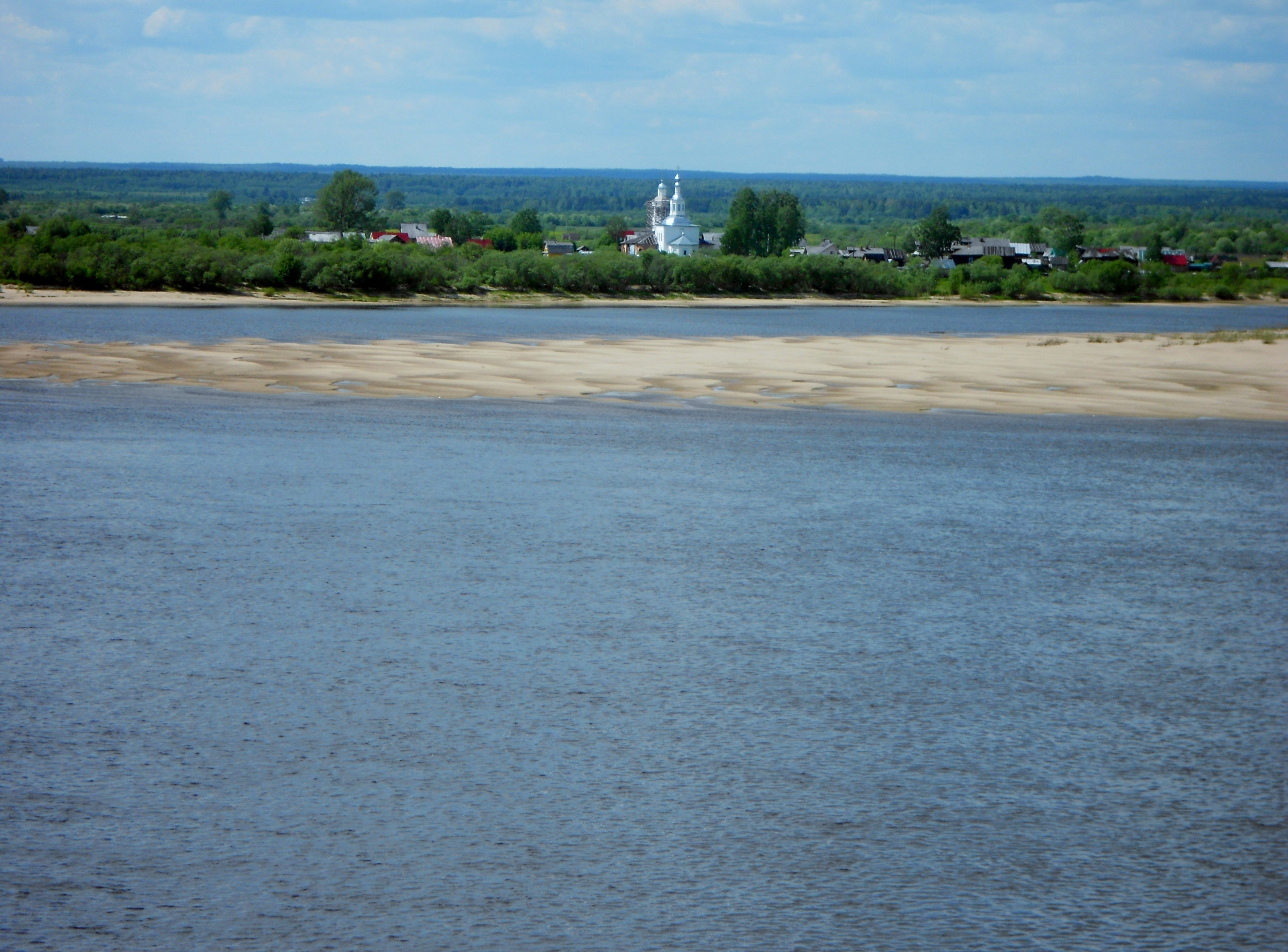 Архангельская область, Котлас